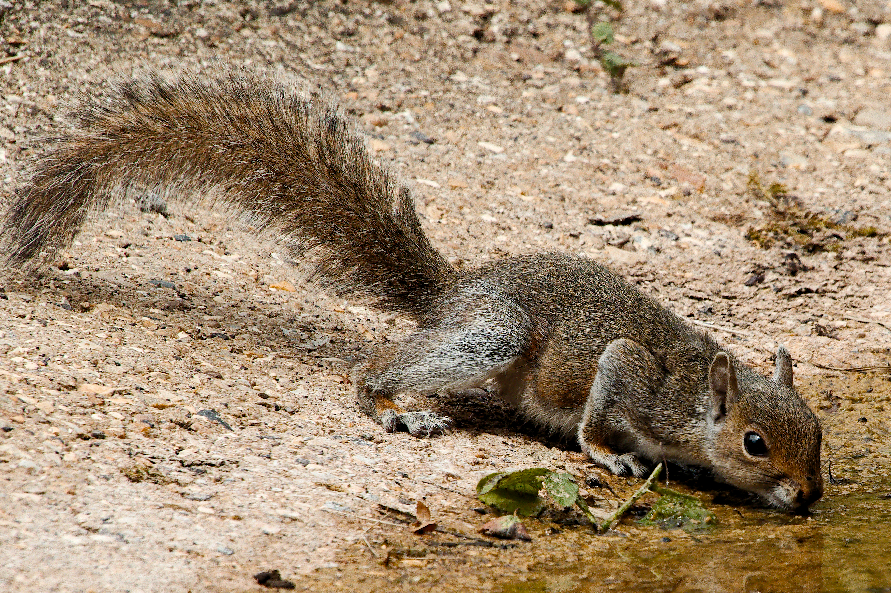 Squig - RSPB Sandy